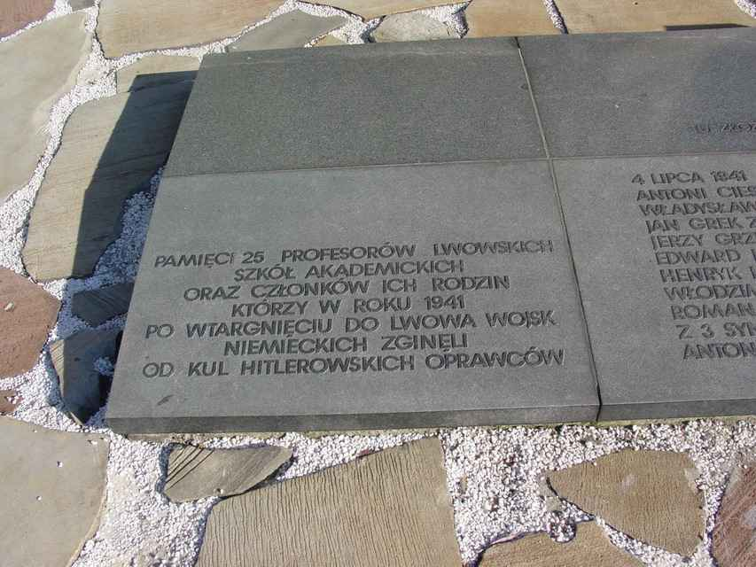 Stako, May 2005